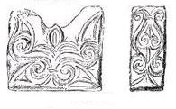 Torre no conjunto de Ager